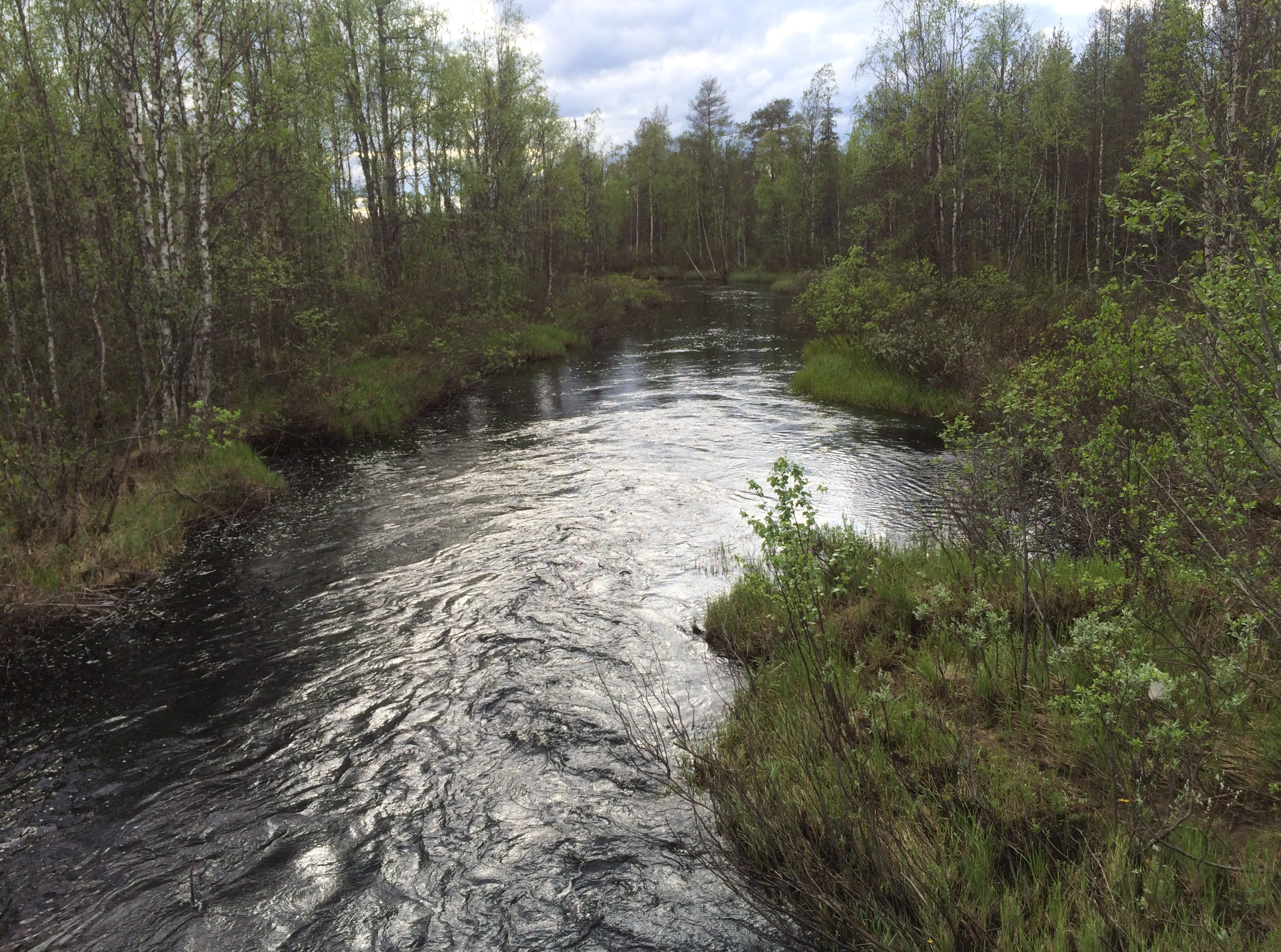 река Така